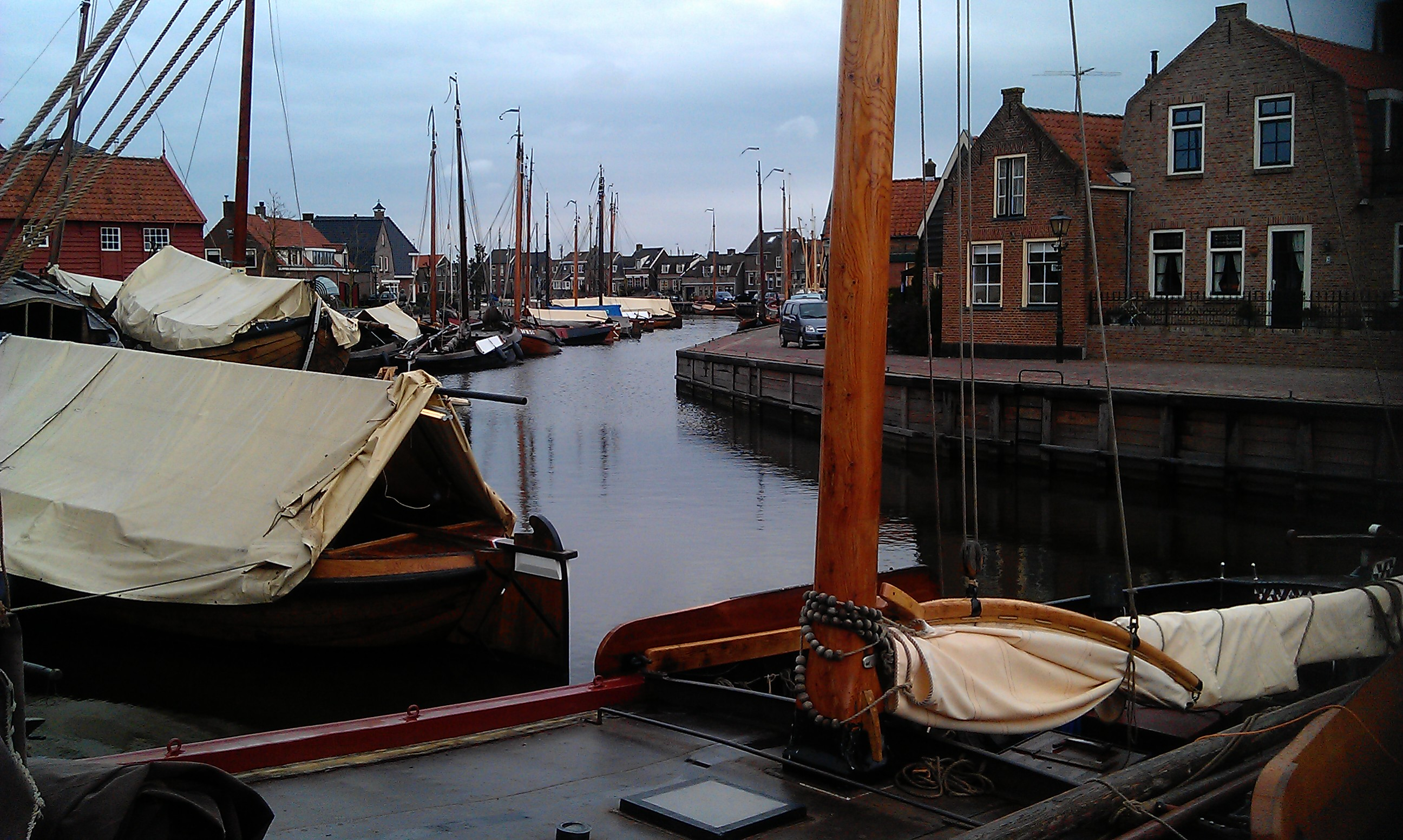 haven van Spakenburg